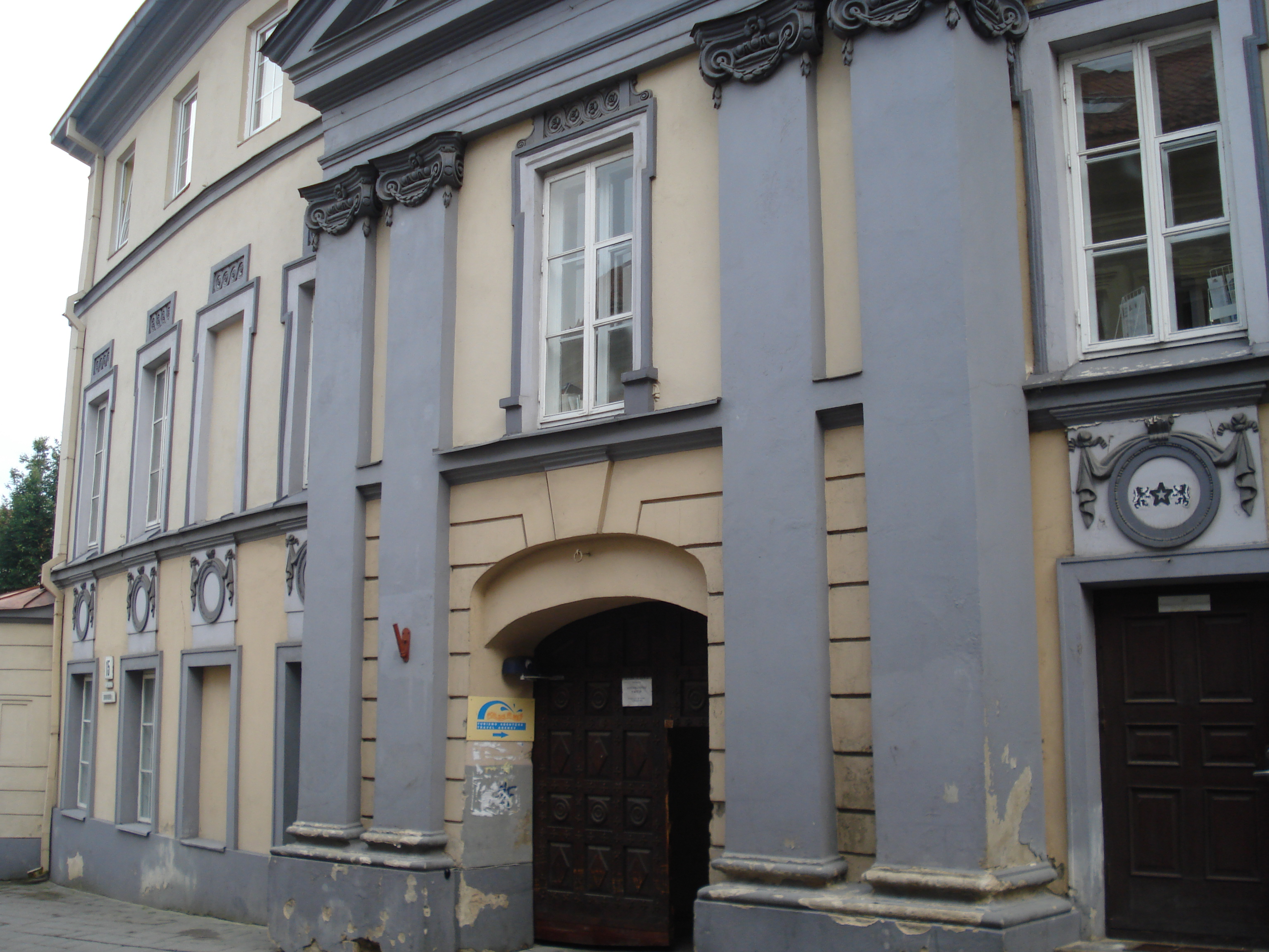 Gureckich Palace in Vilnius, Dominikonų g. 15/1